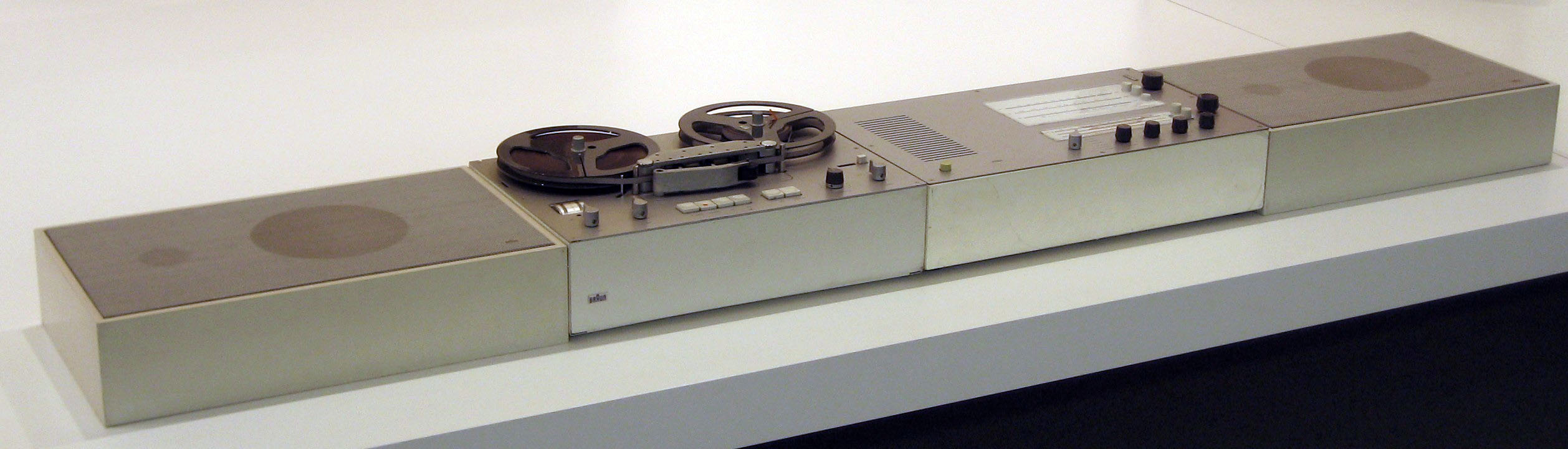 Hifi-Anlage TS 45, TG 60, L 450, 1964/65, Pinakothek der Moderne, München Hersteller: Braun AG, Frankfurt a.M., Deutschland Dieter Rams geb. 1932